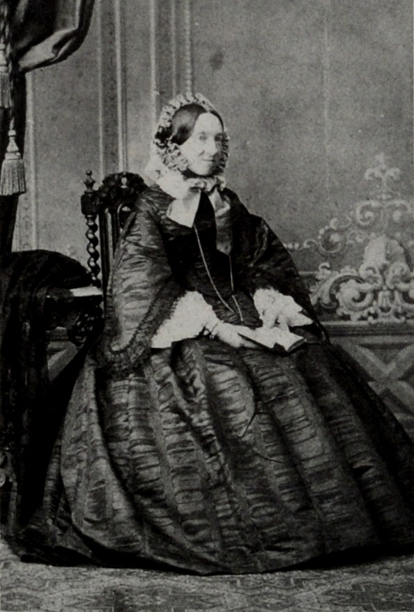 בטסי בודנברוק